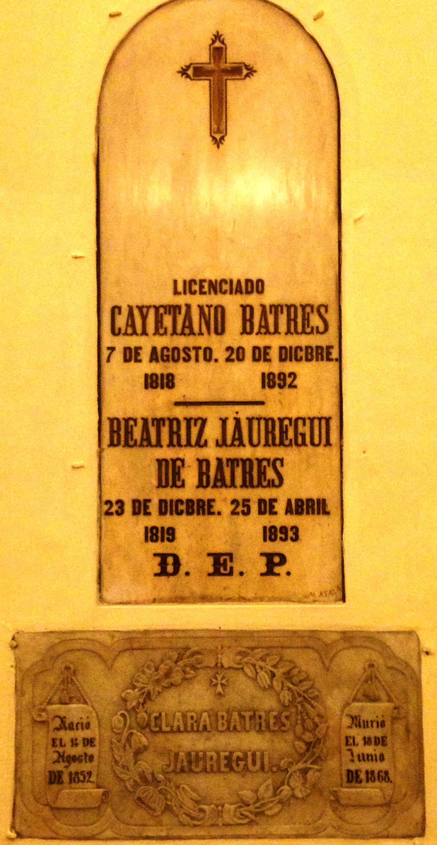 Tumba de la familia Batres Jauregui en una de las columnas del Templo de Santo Domingo en la Ciudad de Guatemala.